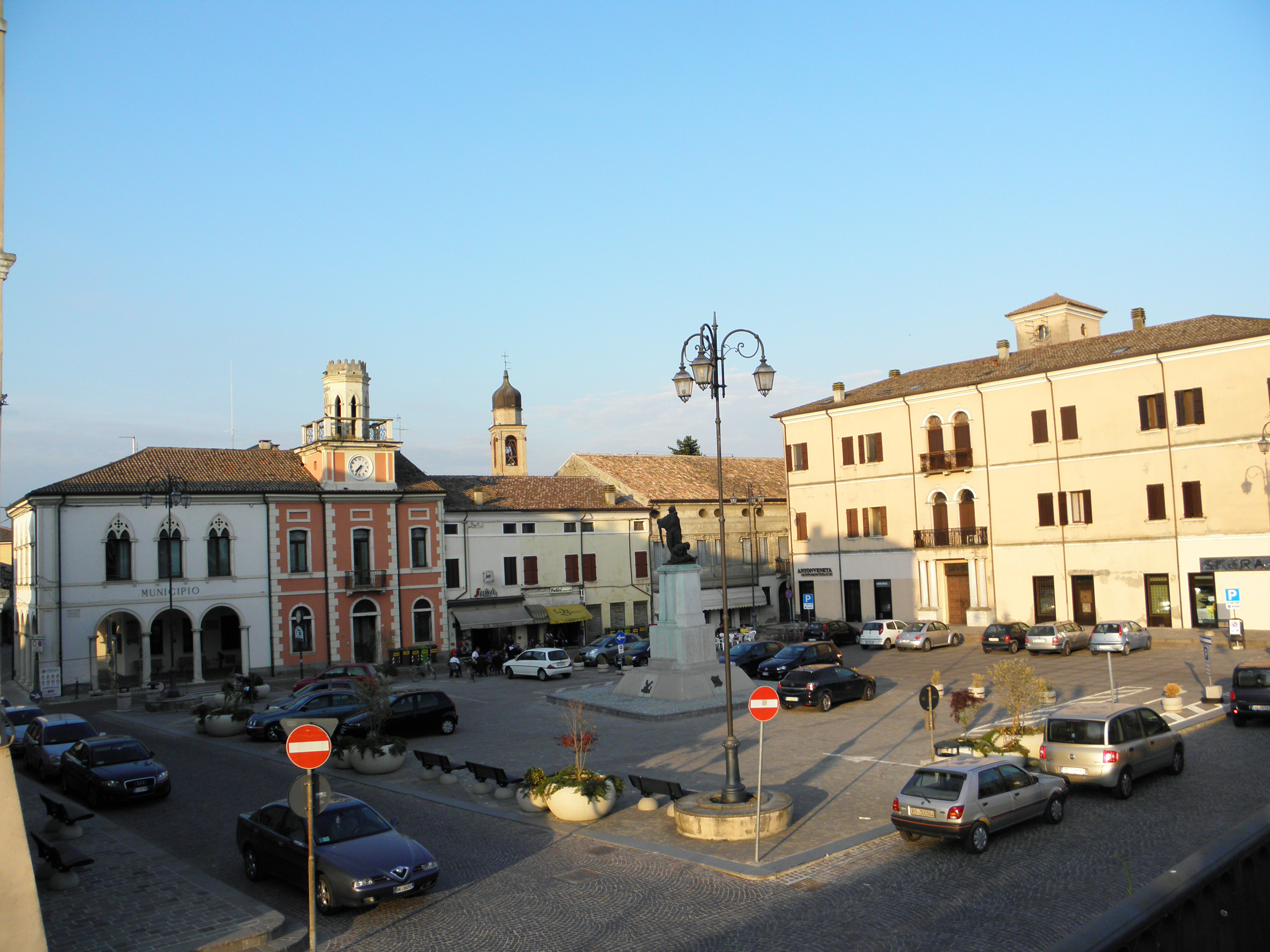 Ariano nel Polesine: la centrale Piazza Garibaldi dove si affaccia anche il palazzo municipale.